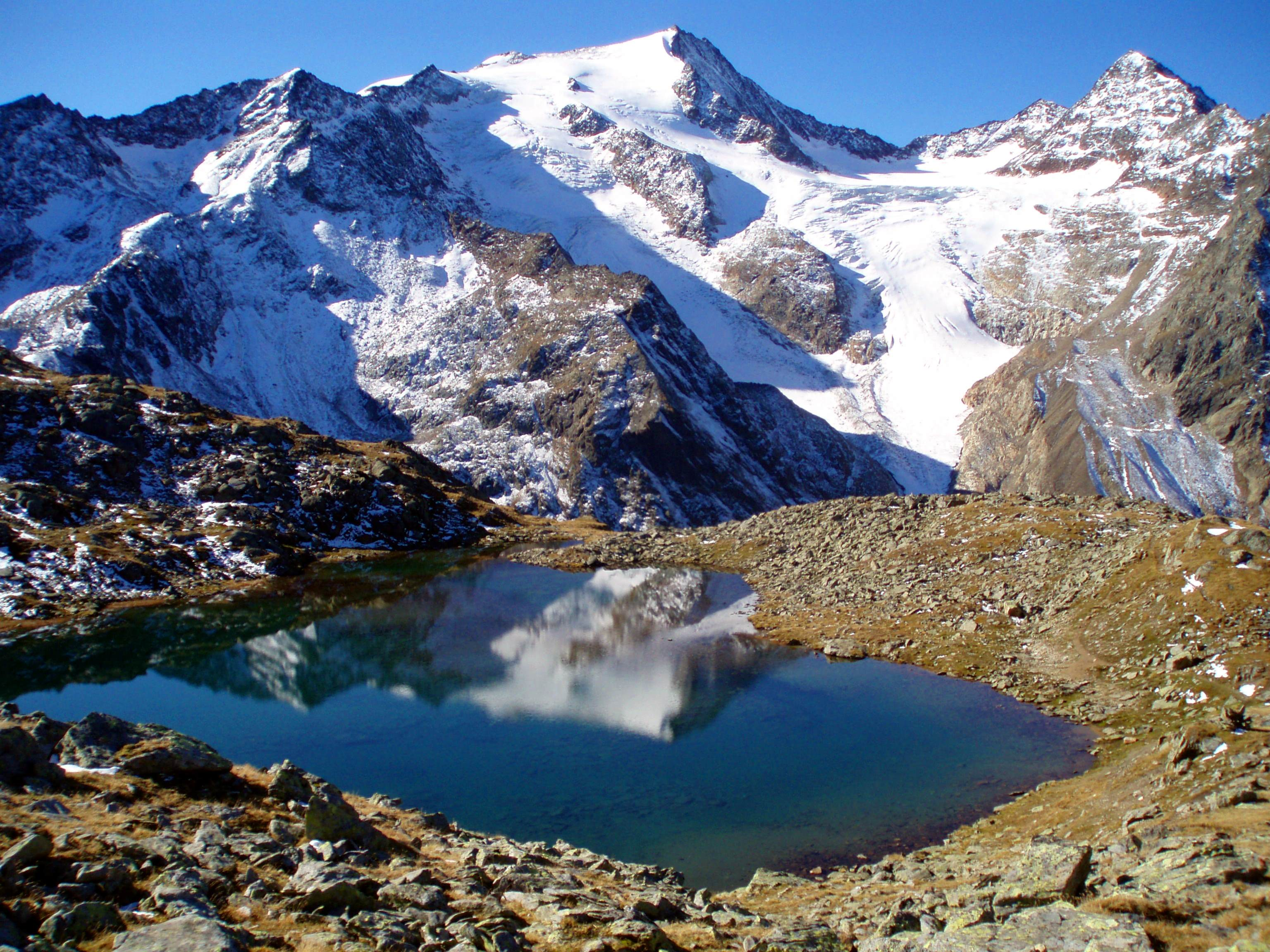 Blick über den Oberen Grünausee zum Wilden Freiger